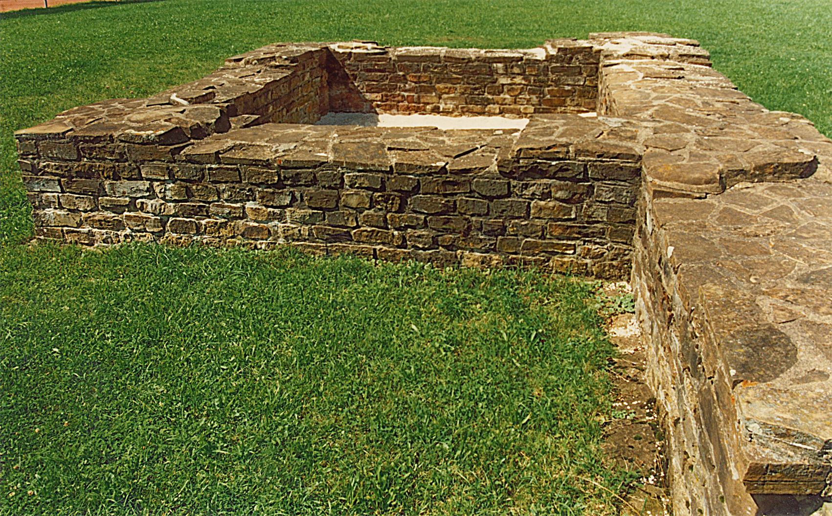 Kastell Unterböbingen, Obergermanisch-Raetischer Limes, Zwischenturm, Baden-Württemberg